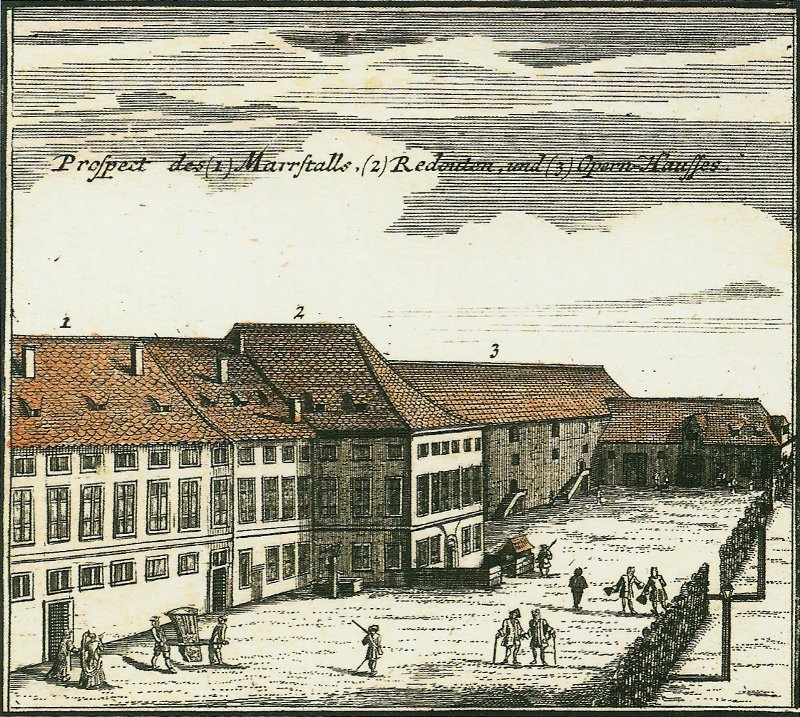 Langes Haus, Redoutensaal und Markgrafentheater in Erlangen. Randbild aus dem Homannschen Stadtplan.